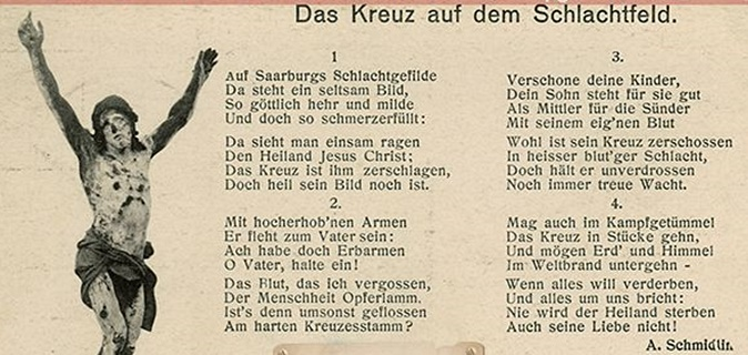 Sogenanntes Kreuz bei Saarburg (in Buhl stehend), dem am 20.8.1914 das Kreuz wegeschossen wurde und die Christusfigur stehen blieb. (eigener Scan von eigener alter Postkarte, von 1915)